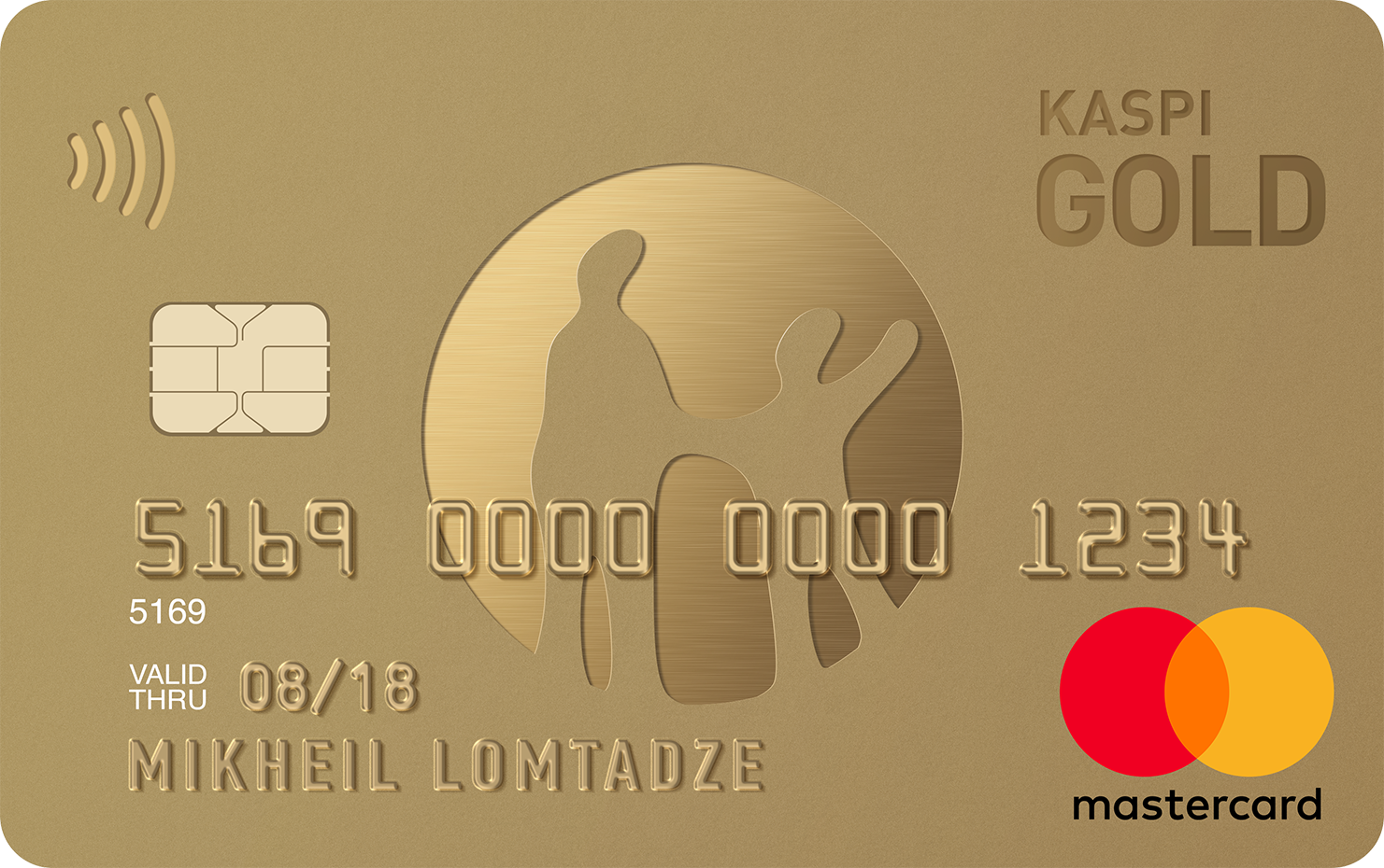 Шаблон карты Kaspi Gold